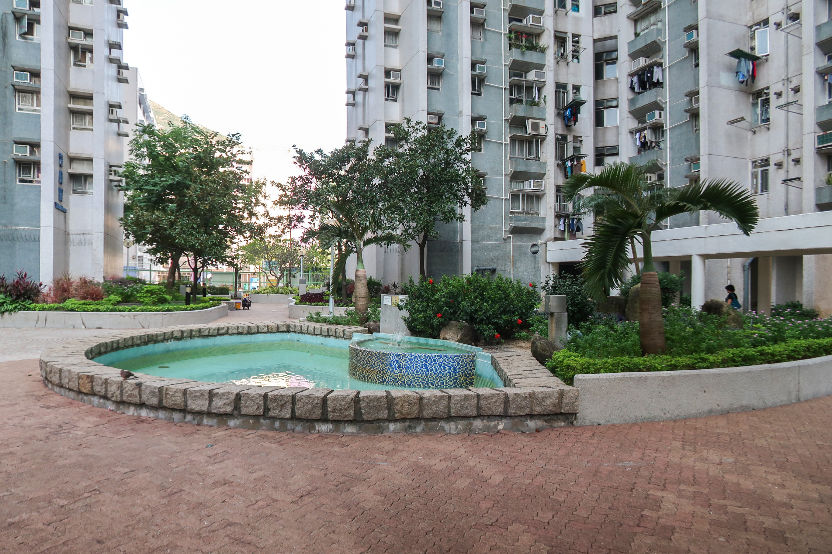 Siu Lun Court Fountain 1